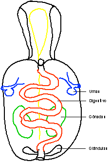 Esquema anatomico de un equiuroideo. Dibujo propio